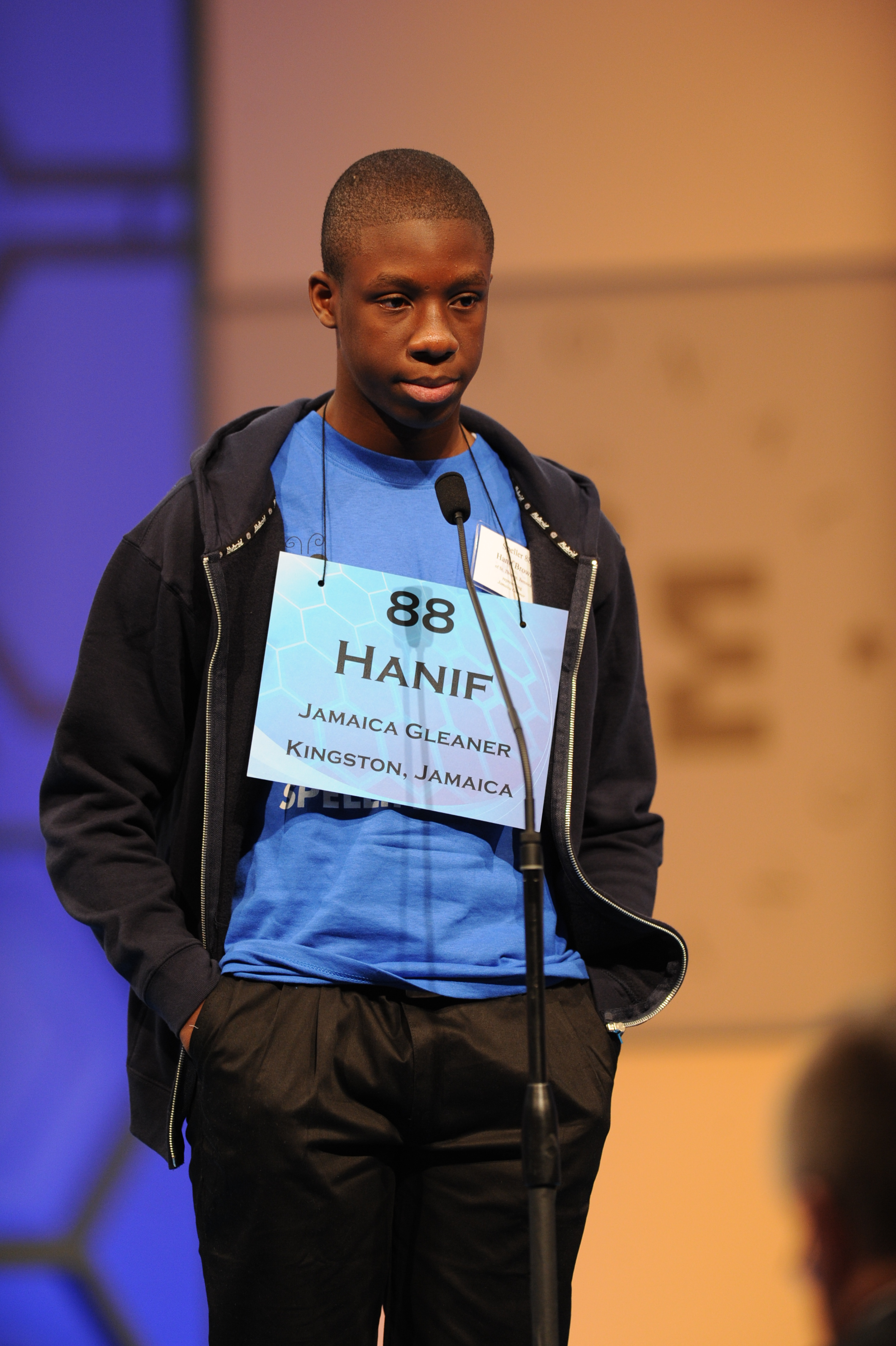 D3S_2013